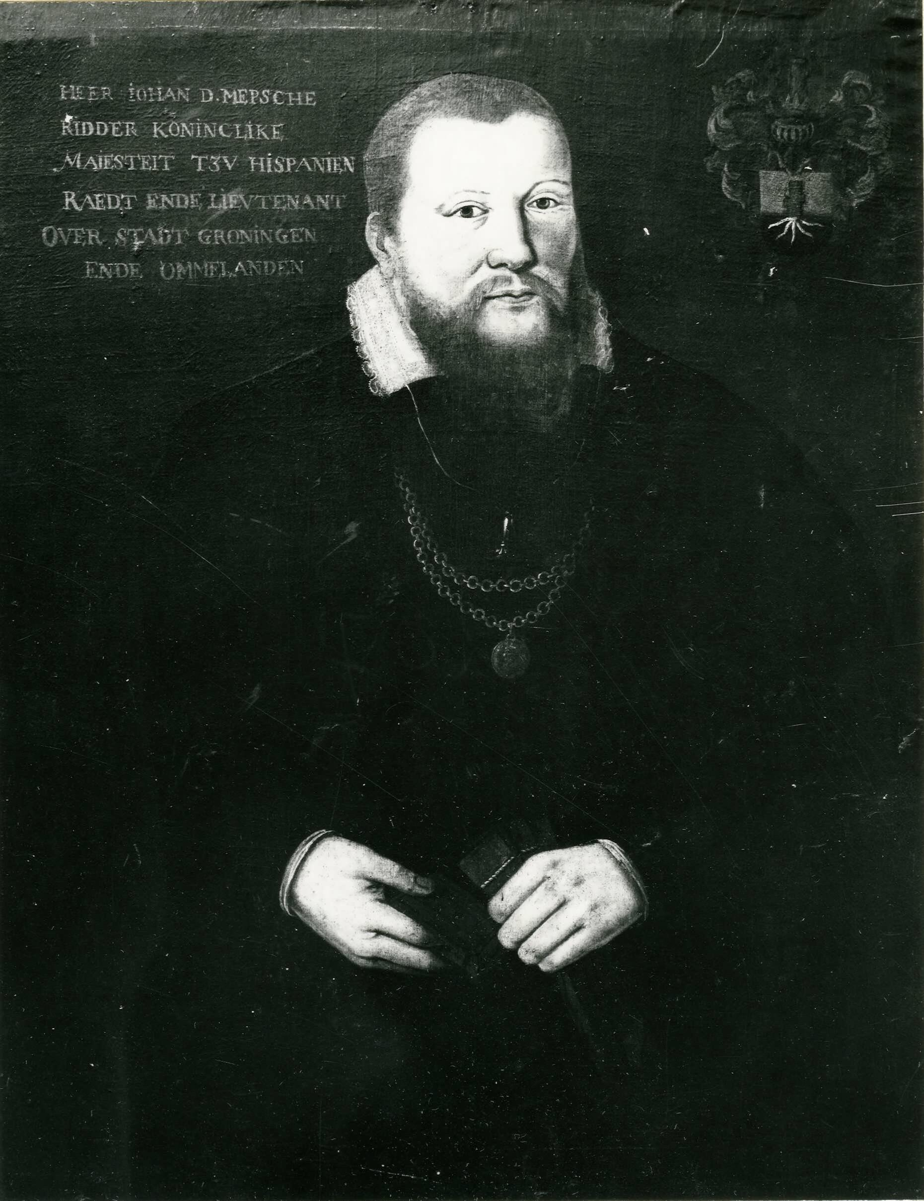 Johan de Mepsche (ca. 1520-1585), Spaansgezind luitenant-stadhouder in Groningen. Rechtsboven is de tekst te lezen: “Heer Iohan D.Mepsche Ridder koninclike Maiesteit tev Hispanien Raedt ende lievtenant Over stadt Groningen ende Ommelanden”